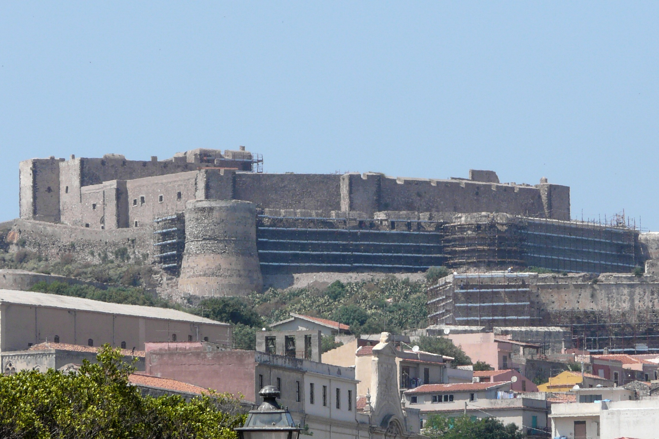 Description château de la ville Sicilienne de Milazzo DateMay 2009SourceOwn workAuthorBRUNNER Emmanuel,Manu25 château de la ville Sicilienne de Milazzo